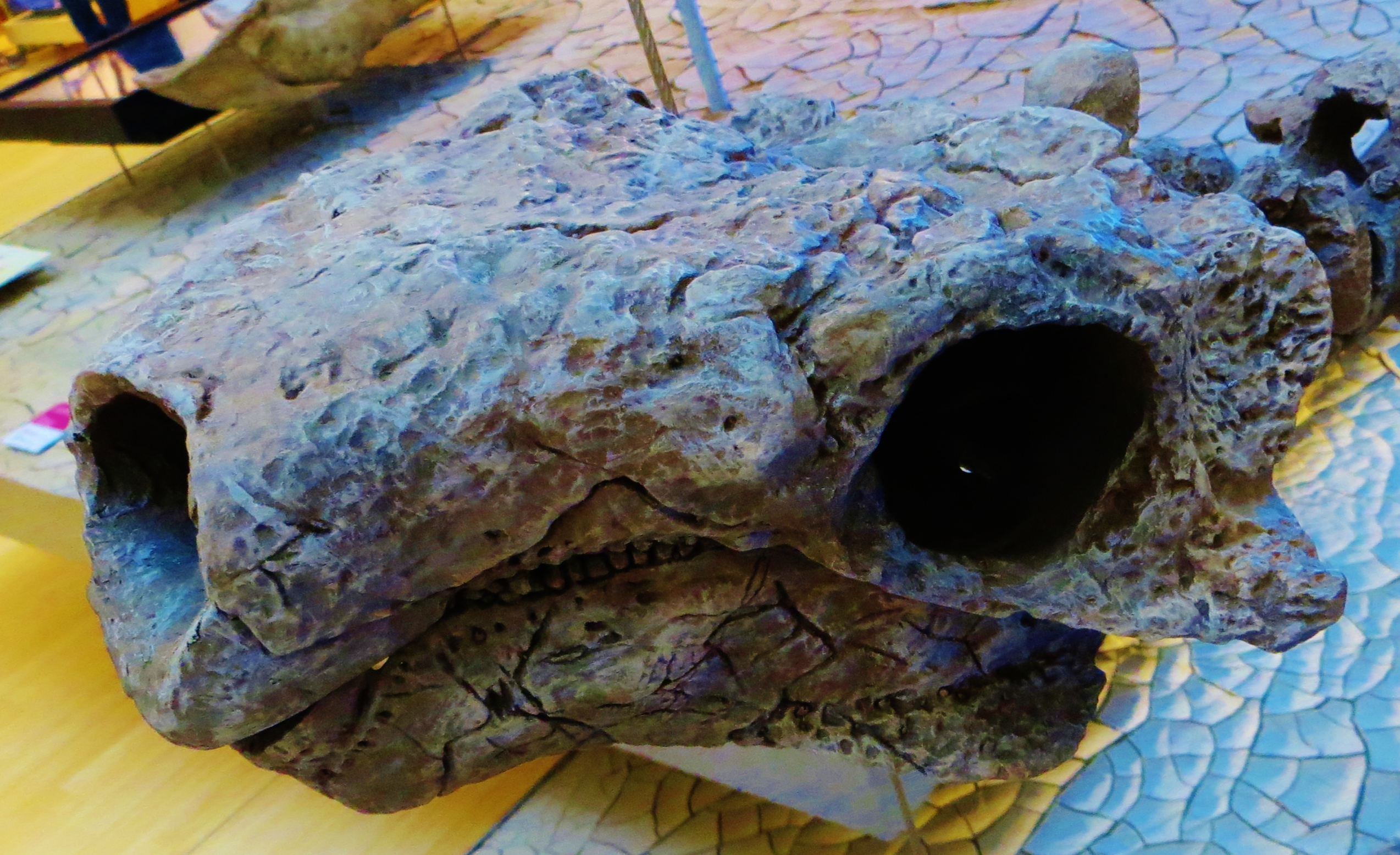 Fossil of Talarurus, an extinct reptile- Took the picture at Muse (Trento)